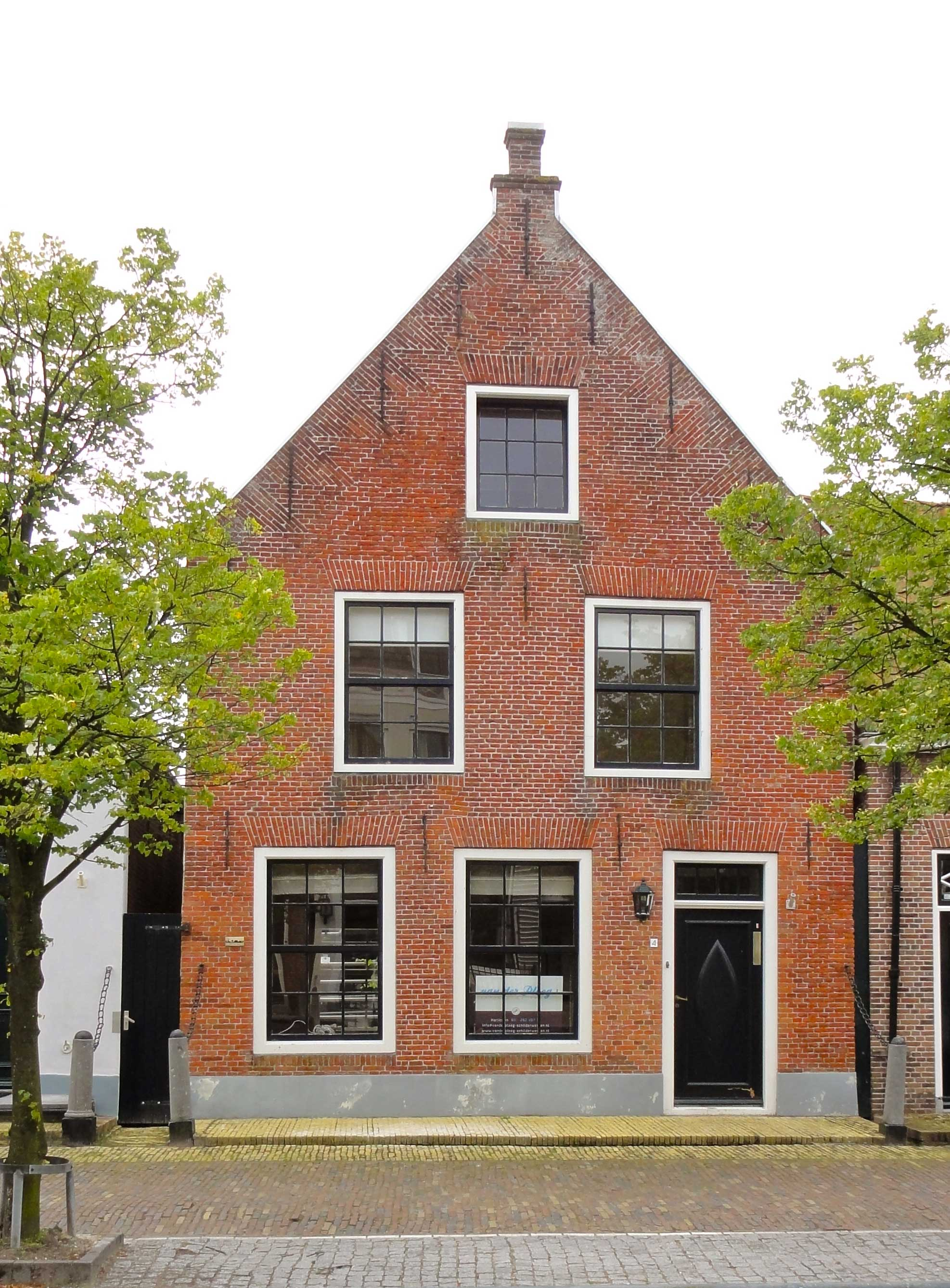 Pruikmakershoek 4 te Makkum